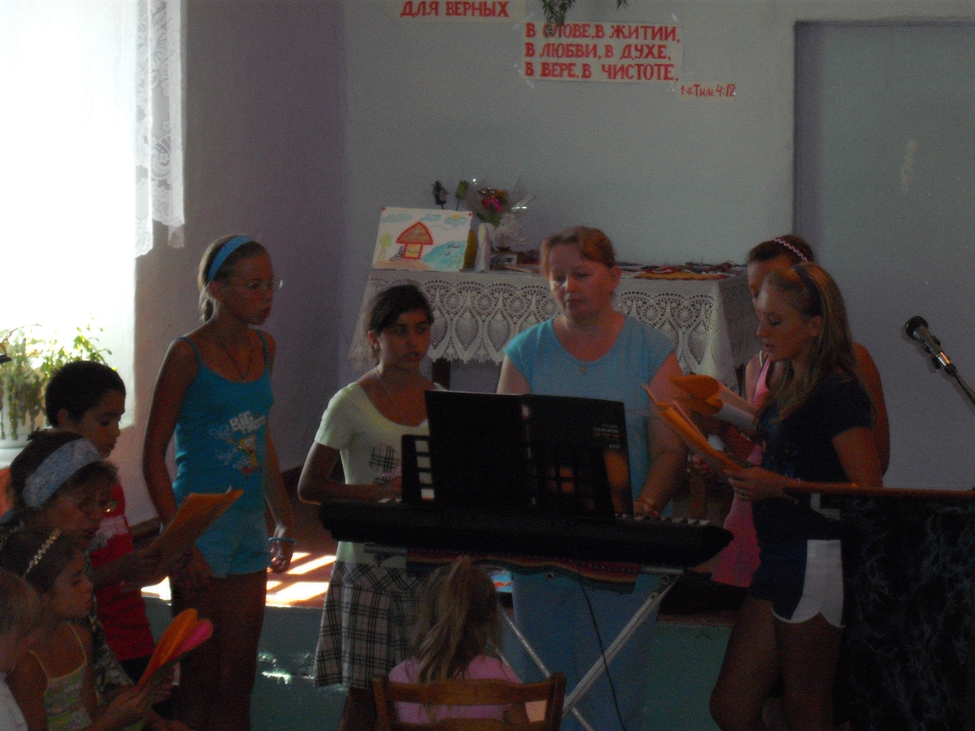 Клуб "Майбутнє України" у селі Косівка, Білгород-Дністровський район Одеської області.